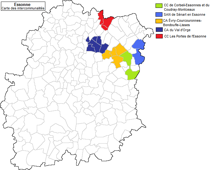 Cartes des établissements intercommunaux en Essonne en 2000